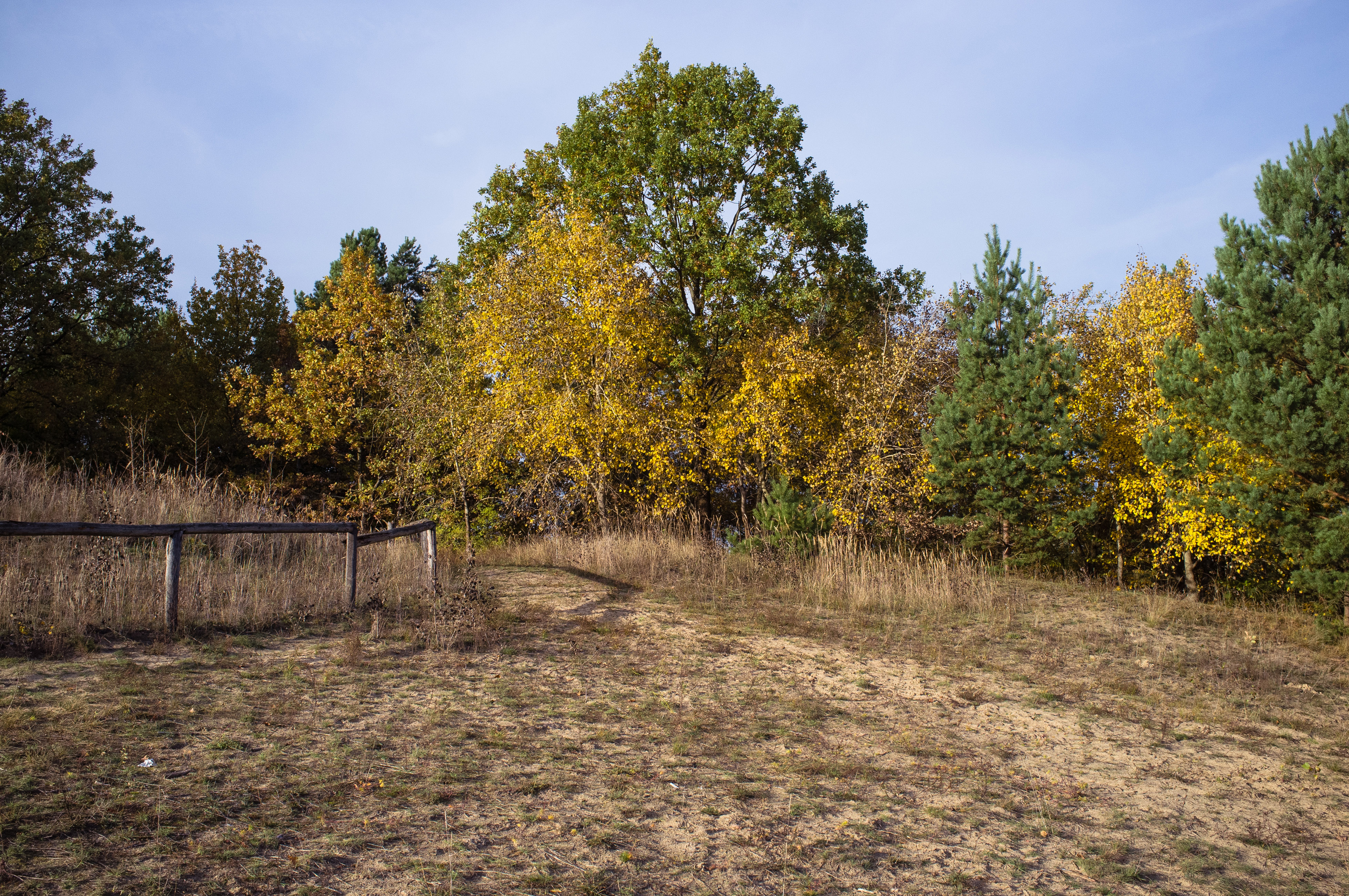 Baumberge (Berlin)